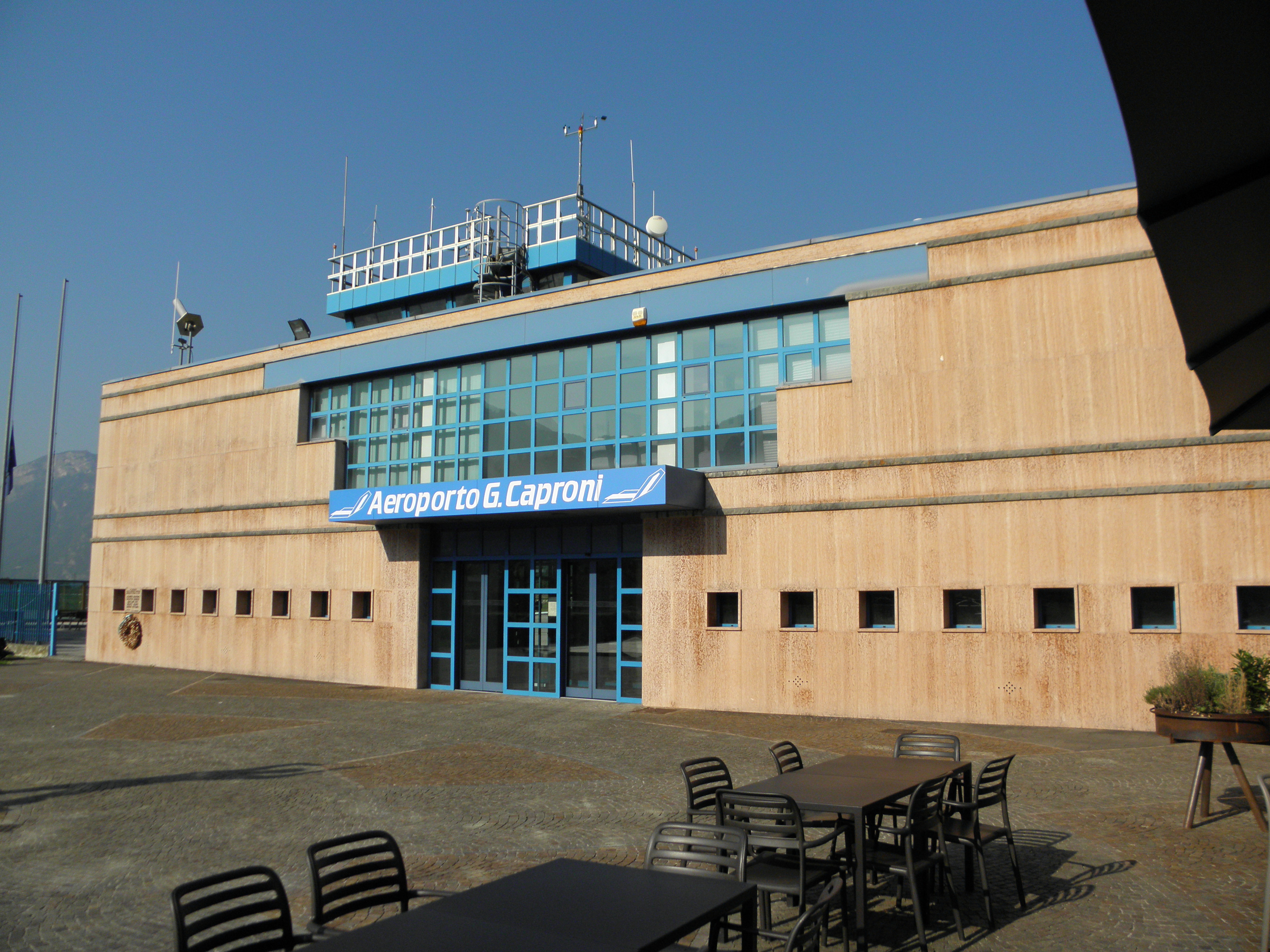 Trento, aeroporto di Trento-Mattarello "Gianni Caproni".